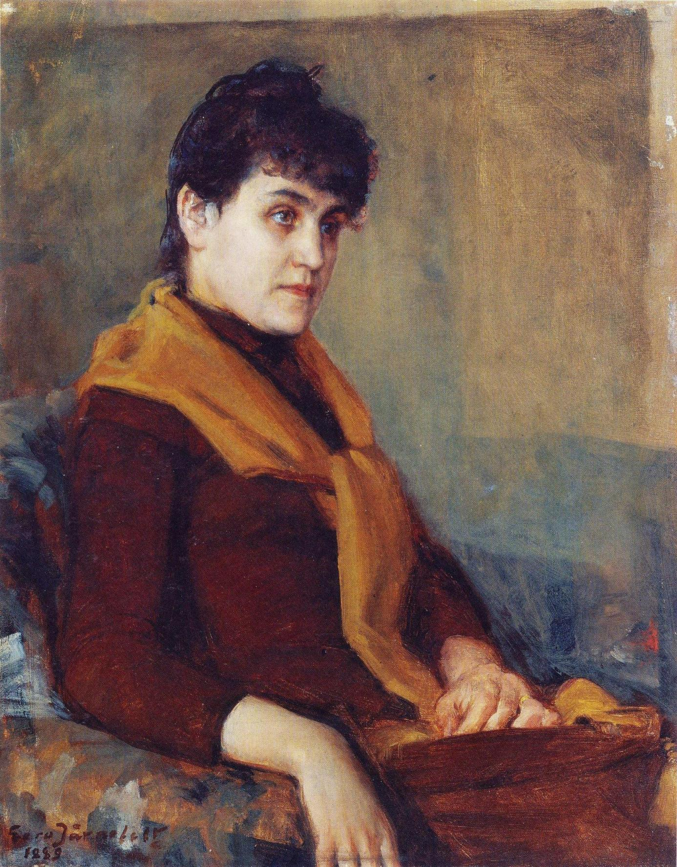 Eero Järnefeltin kihlajaismuotokuva vaimostaan Saimi Järnefeltistä (1867–1944). Kuuluu yksityiskokoelmaan, deponoitu Ateneumin taidemuseoon.